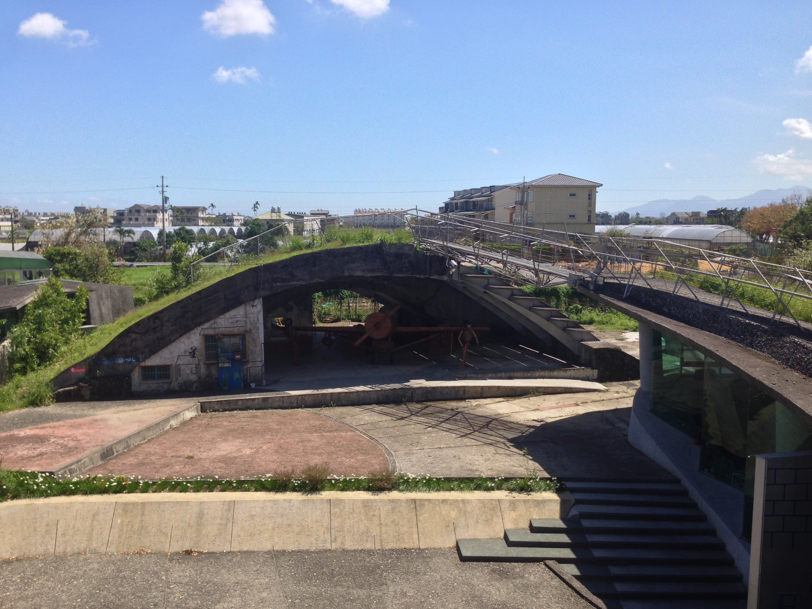 中文（台灣）: 思源里飛機掩體１